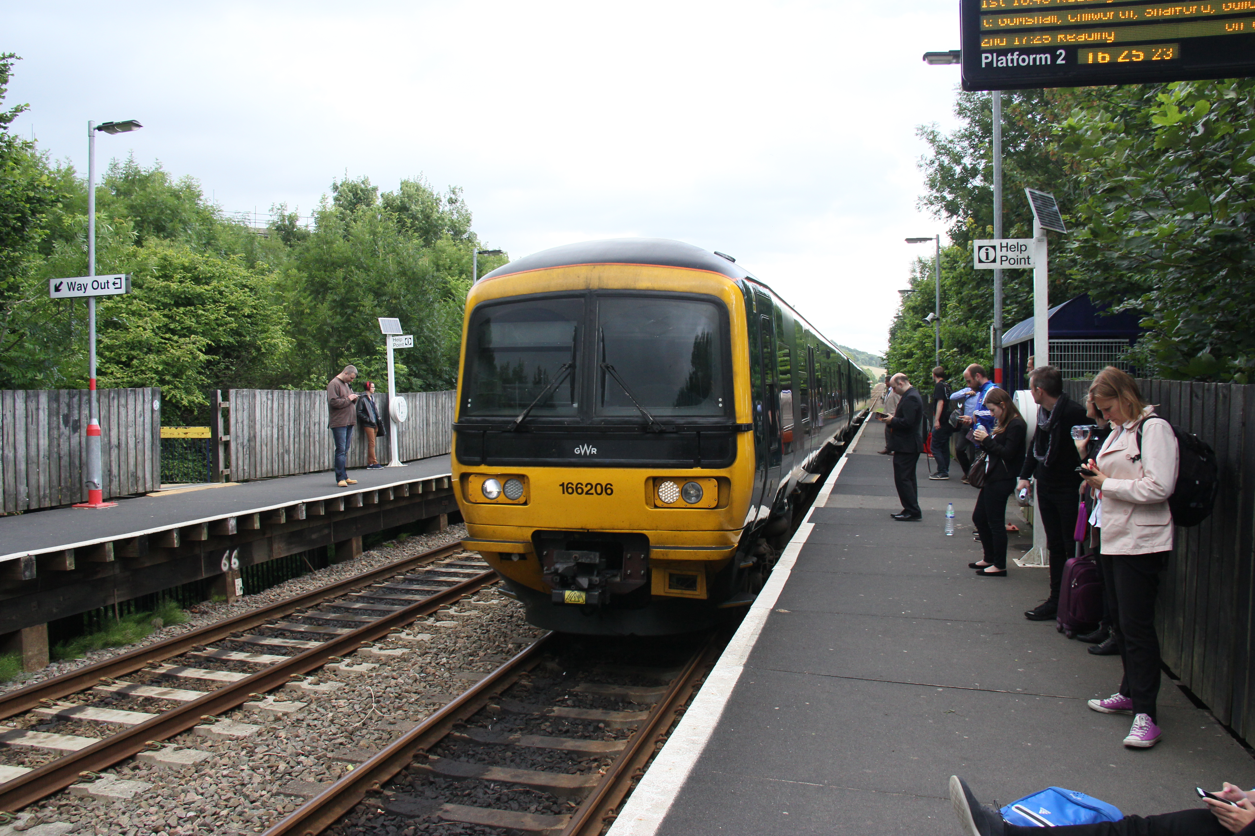 列车驶入多尔金迪普登站。